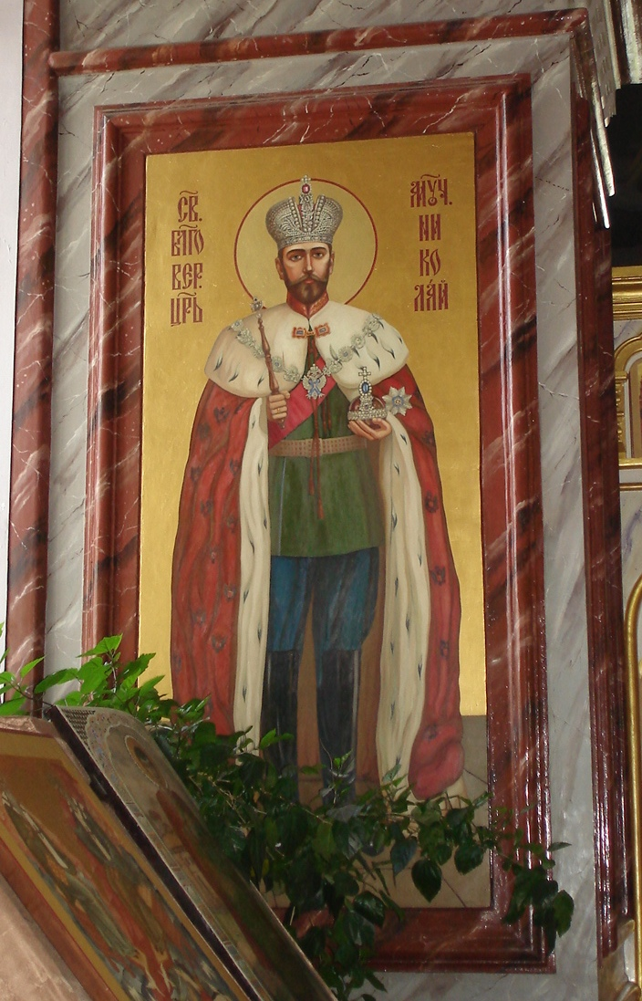 Darstellung Zar Nikolaus II. auf einer Ikone in einer Kirche im Kreml von Saraisk (Oblast Moskau)